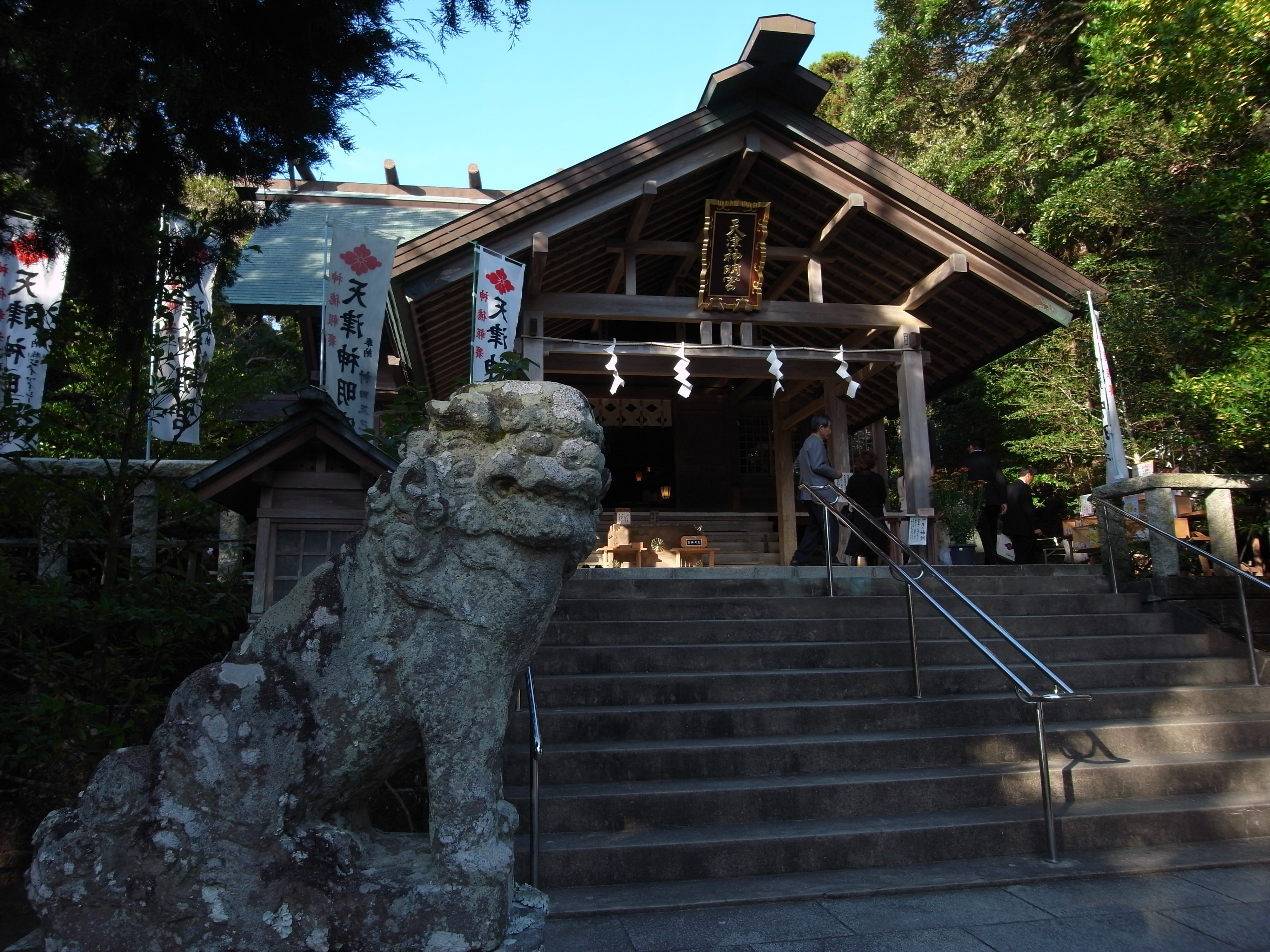 天津神明宮 拝殿と狛犬